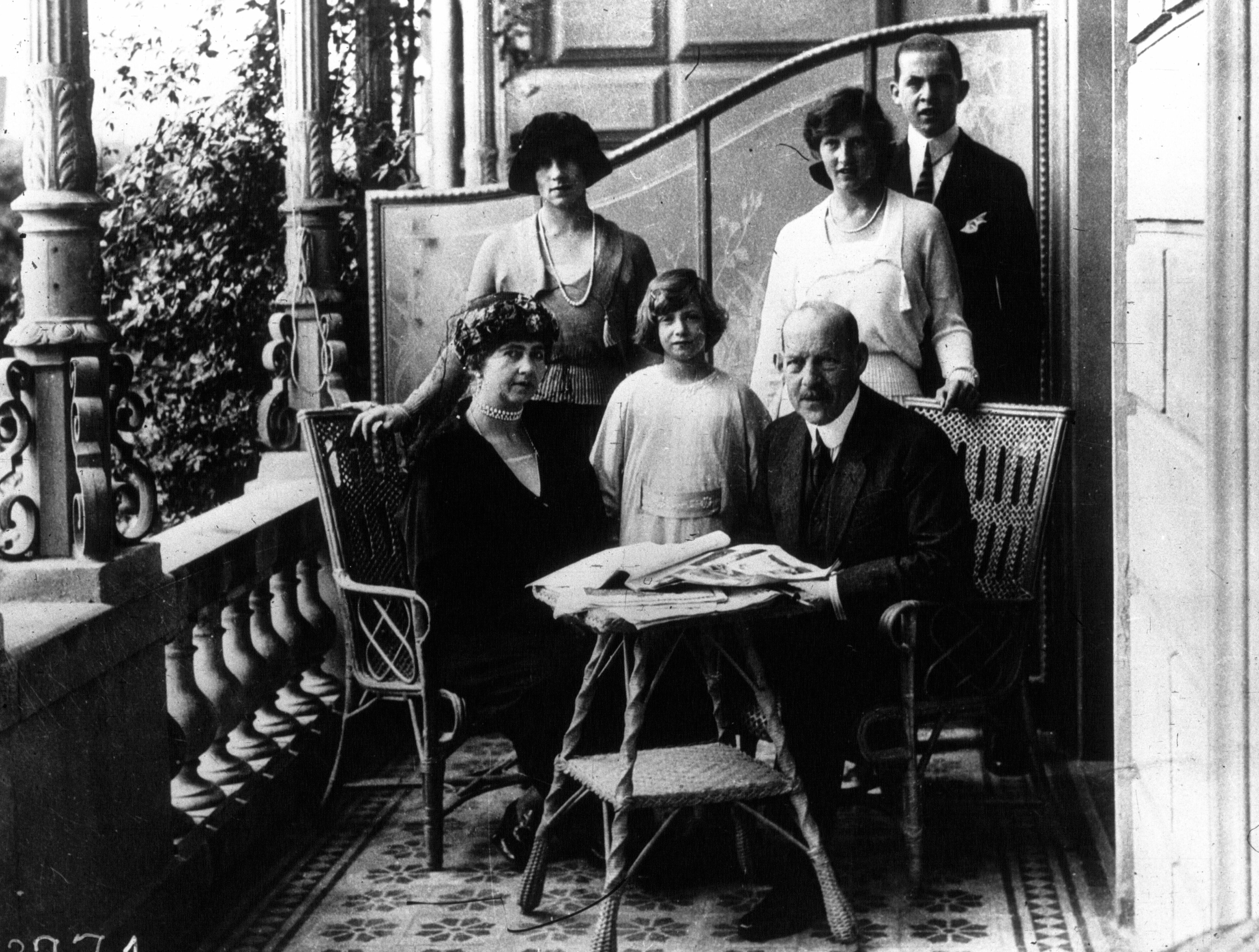 Le roi Constantin de Grèce avec sa famille.